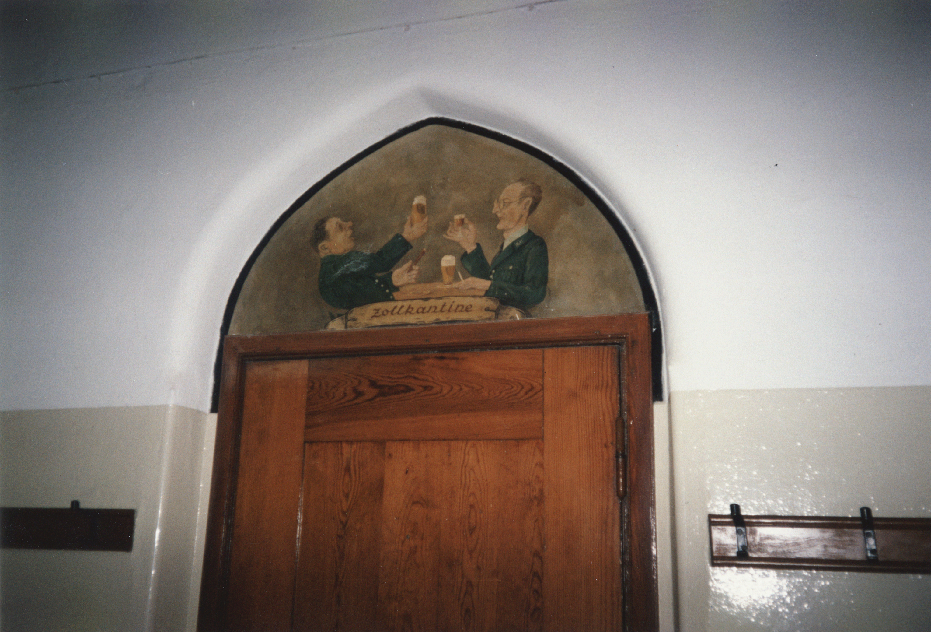 Zollkantine der MSM (Flensburg Mürwik, 12. Februar 1989; die beiden zechenden Zöllner saßen damals häufiger in der Zollkantine, der Maler verewigte sie. Das Bild zweier fröhlich zechenden Zöllner über der Tür der Kantine der ehemaligen Zollschule Flensburg in der Marineschule Mürwik verweist auf den Zweck der Kantine.)